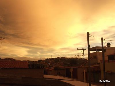 Rua N. Senhora de Loreto, no bairro Ouro Minas